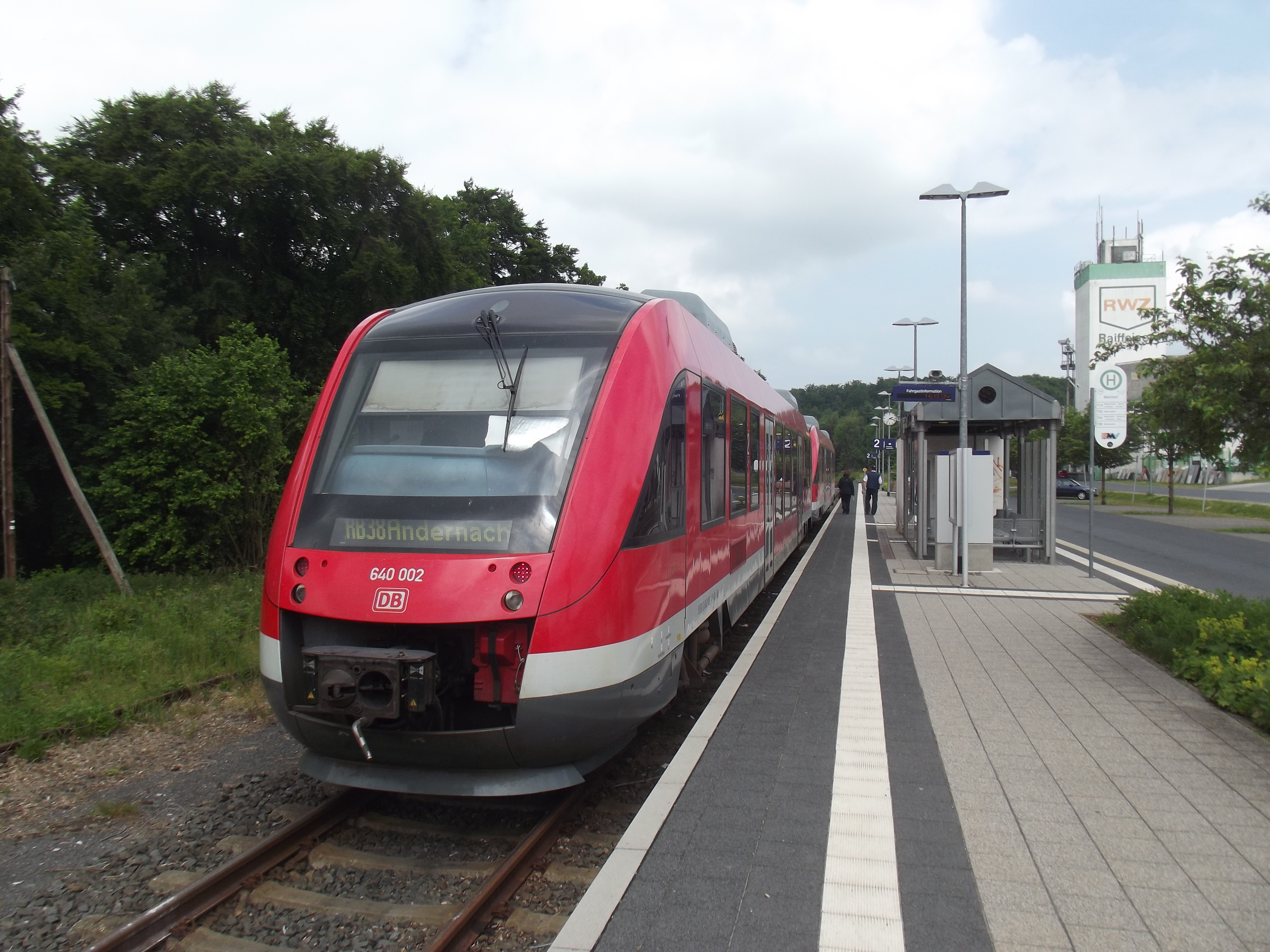 Wachtende trein in Kaisersesch